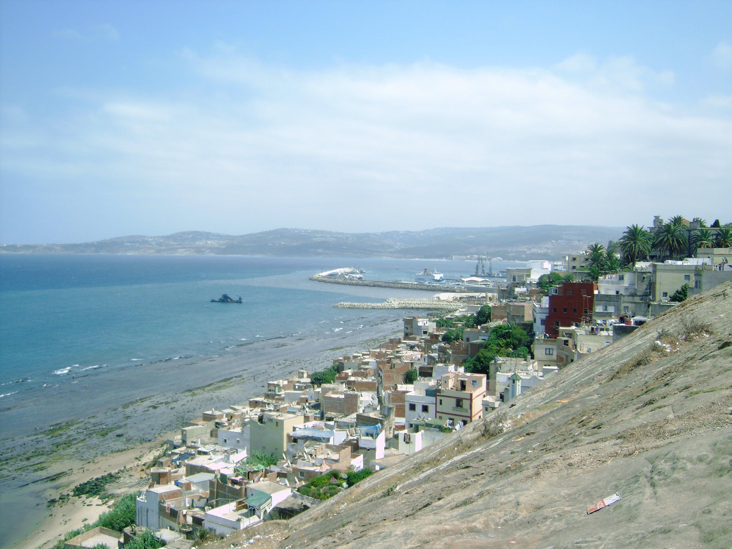 Tanger